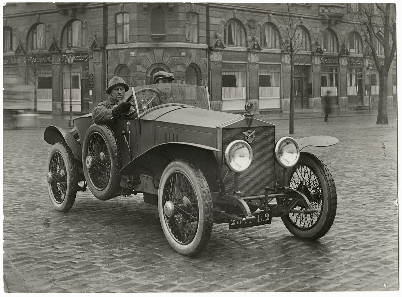 Bignan automobile